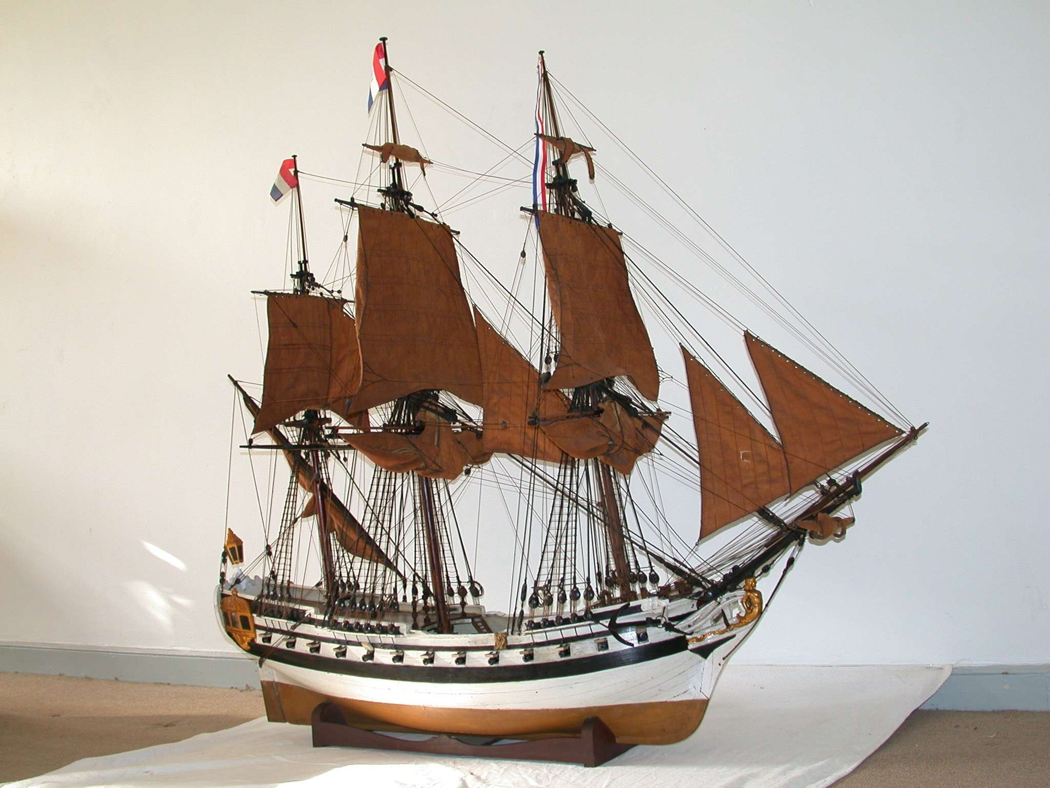 Model van slavenhaler in tijd WIC.